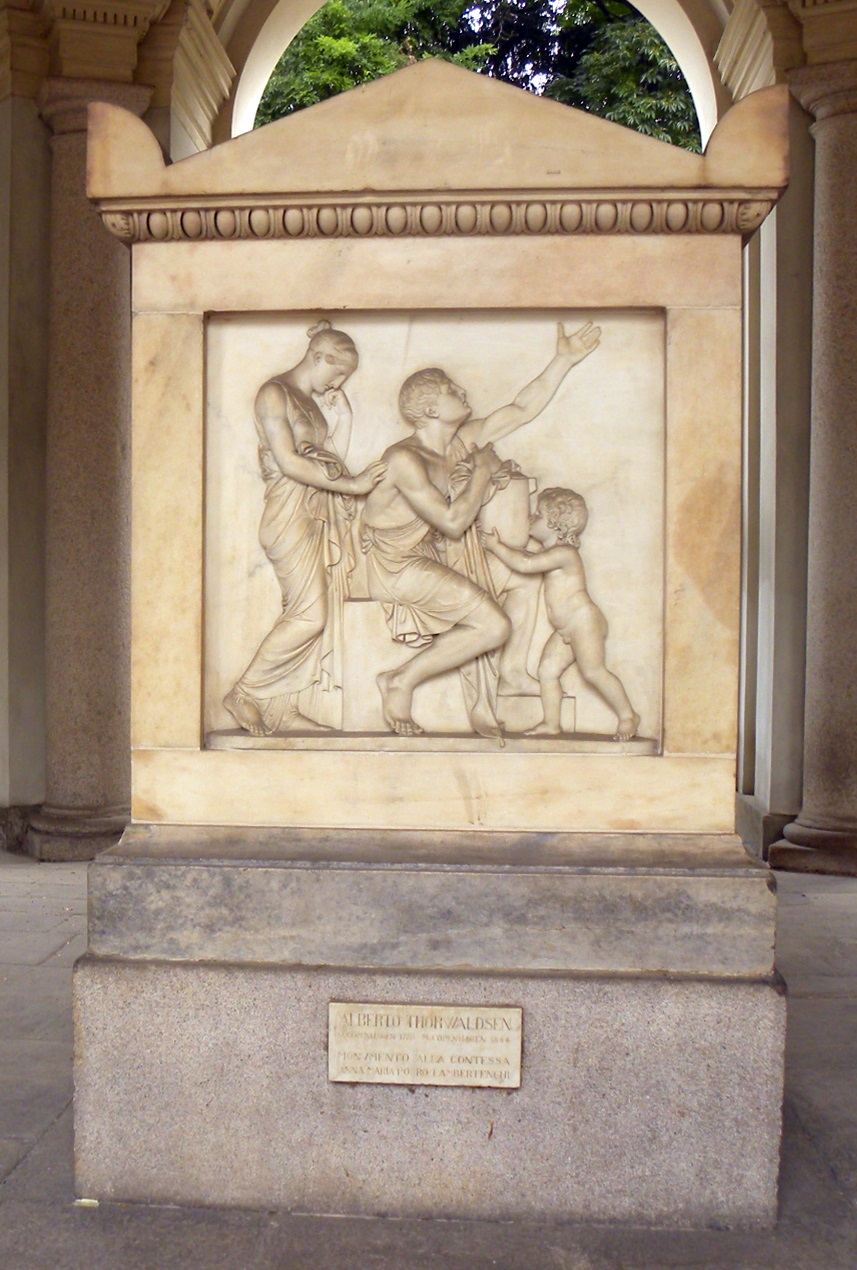 Monumento dedicato ad Anna Maria Serbelloni